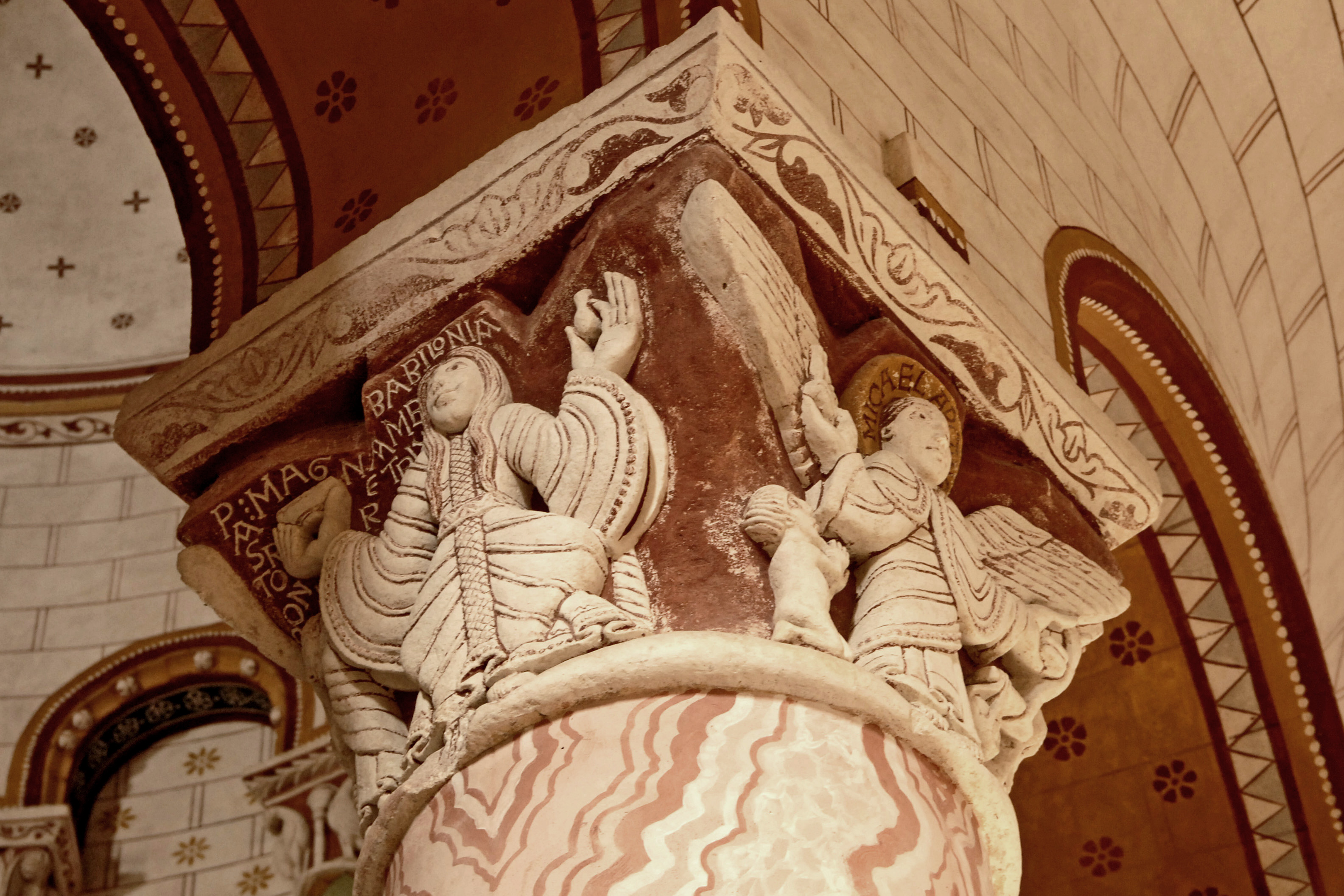 Kapitell II Baylonische Hure